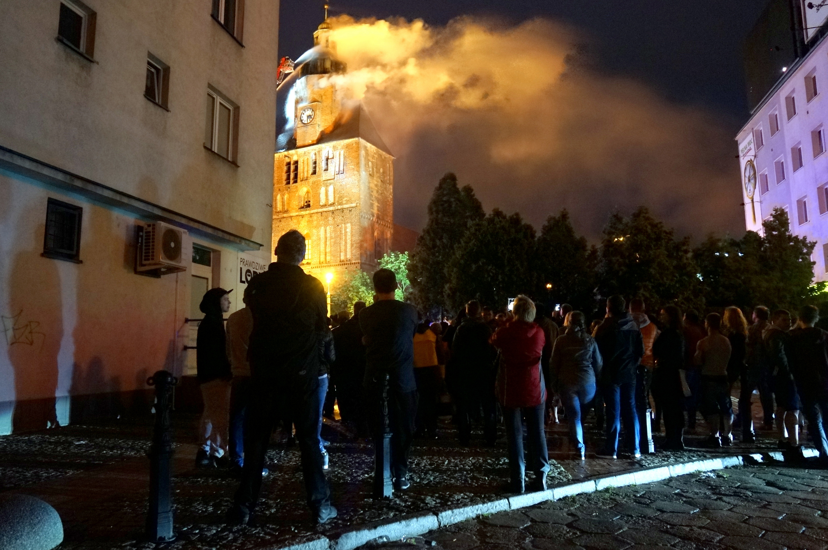 1.07.2017 r. Gorzów Wlkp. Pożar katedry p.w. Wniebowzięcia Najświętszej Maryi Panny. Zostanie ugaszony następnego dnia, rano.